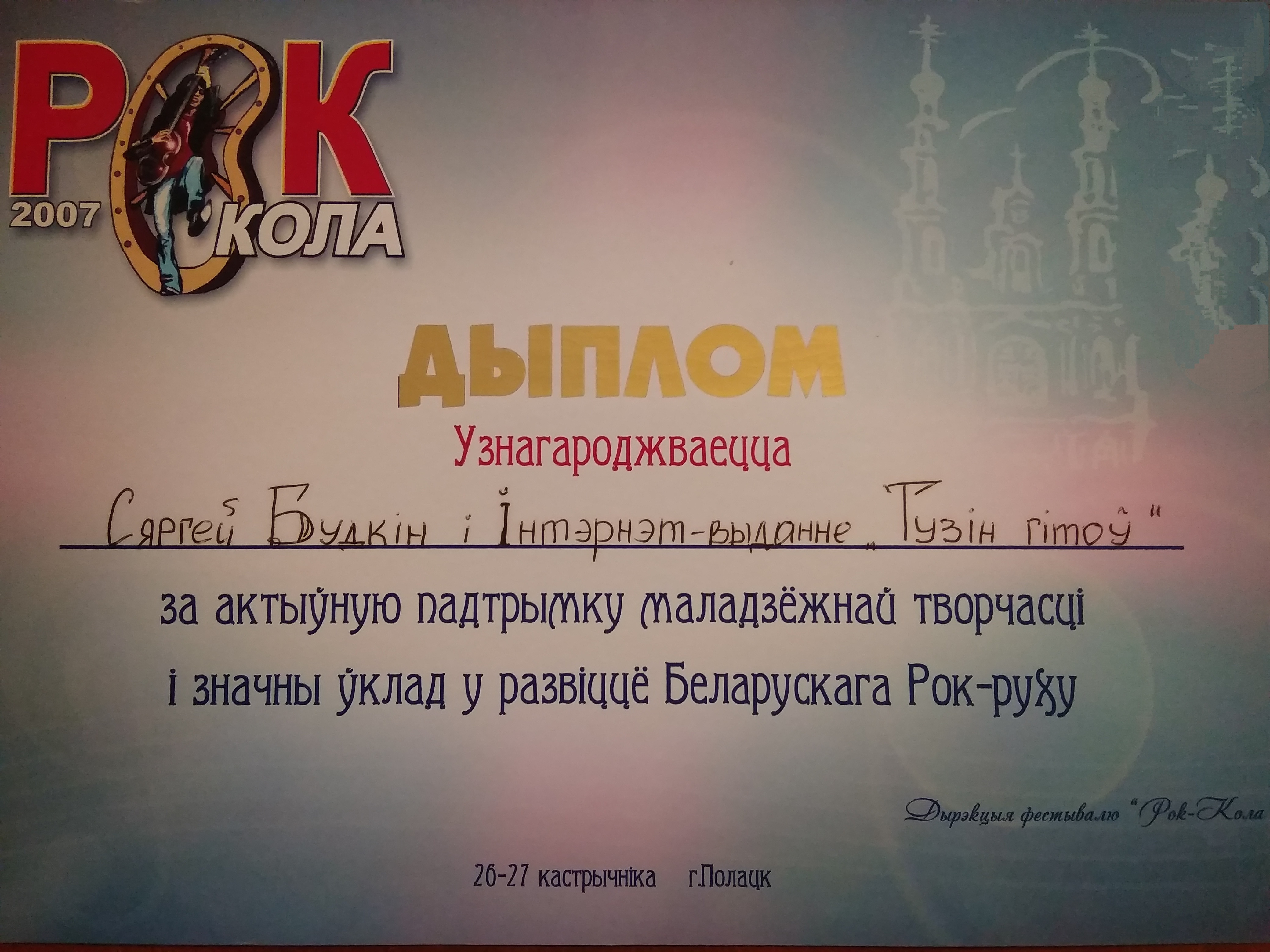 Беларуская (тарашкевіца): Дыплём «За актыўную падтрымку маладзёжнай творчасьці й значны ўклад у развіцьцё беларусскага рок-руху».